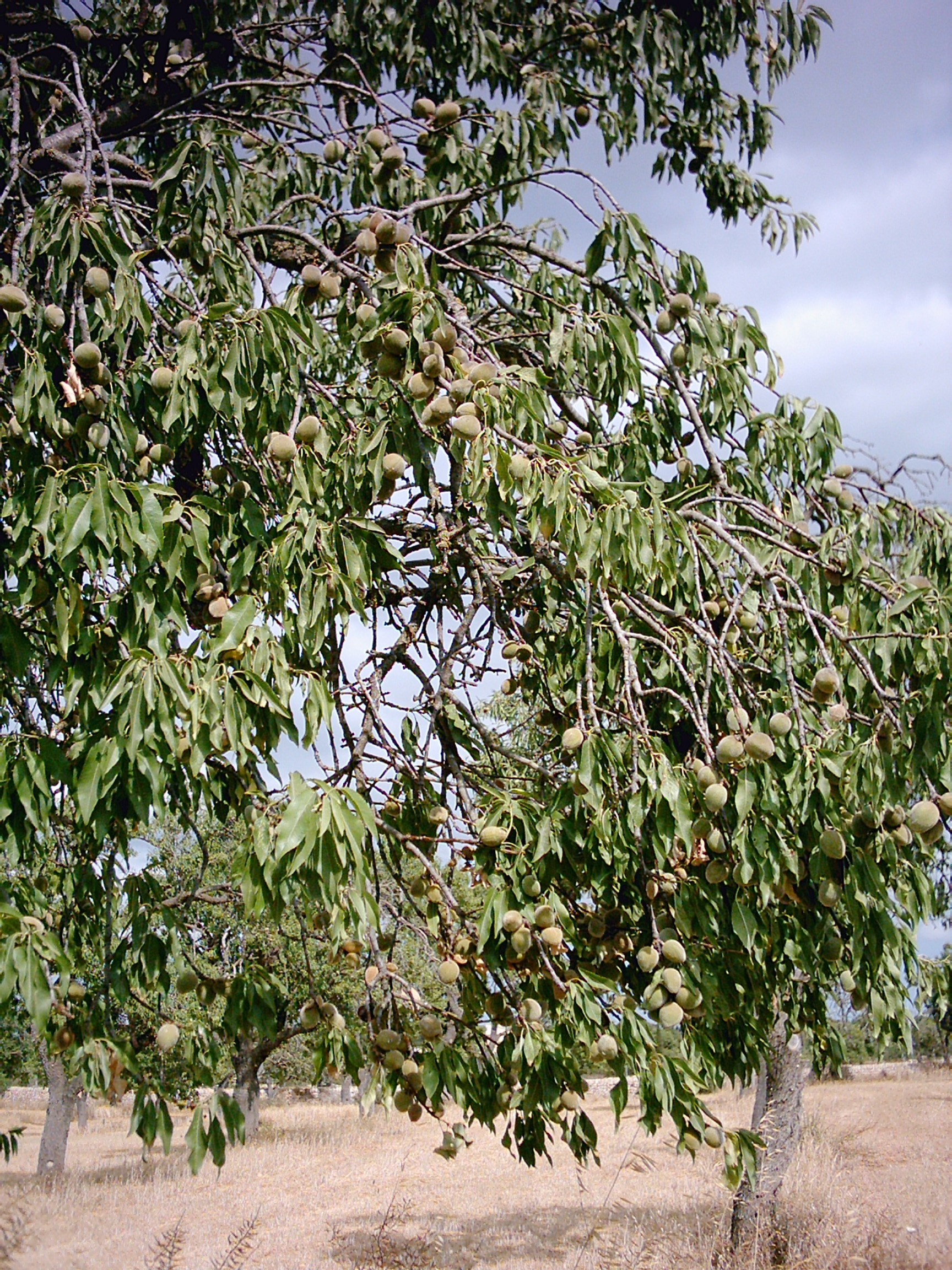 Un ametller carregat d'ametlles, 9 de juliol del 2005, a s'Aranjassa, Mallorca